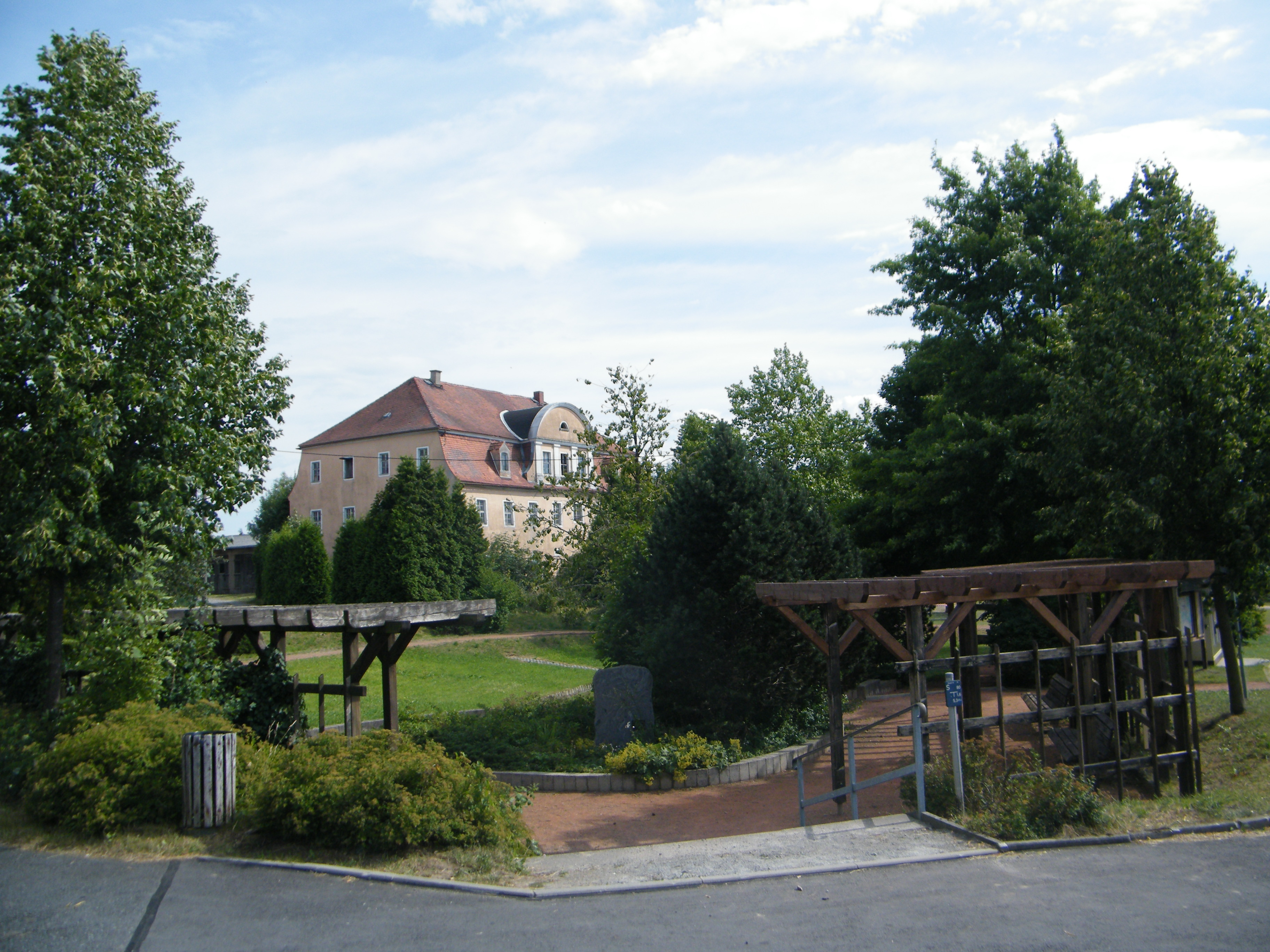 Krumhermsdorf, Dorfplatz mit Herrenhaus